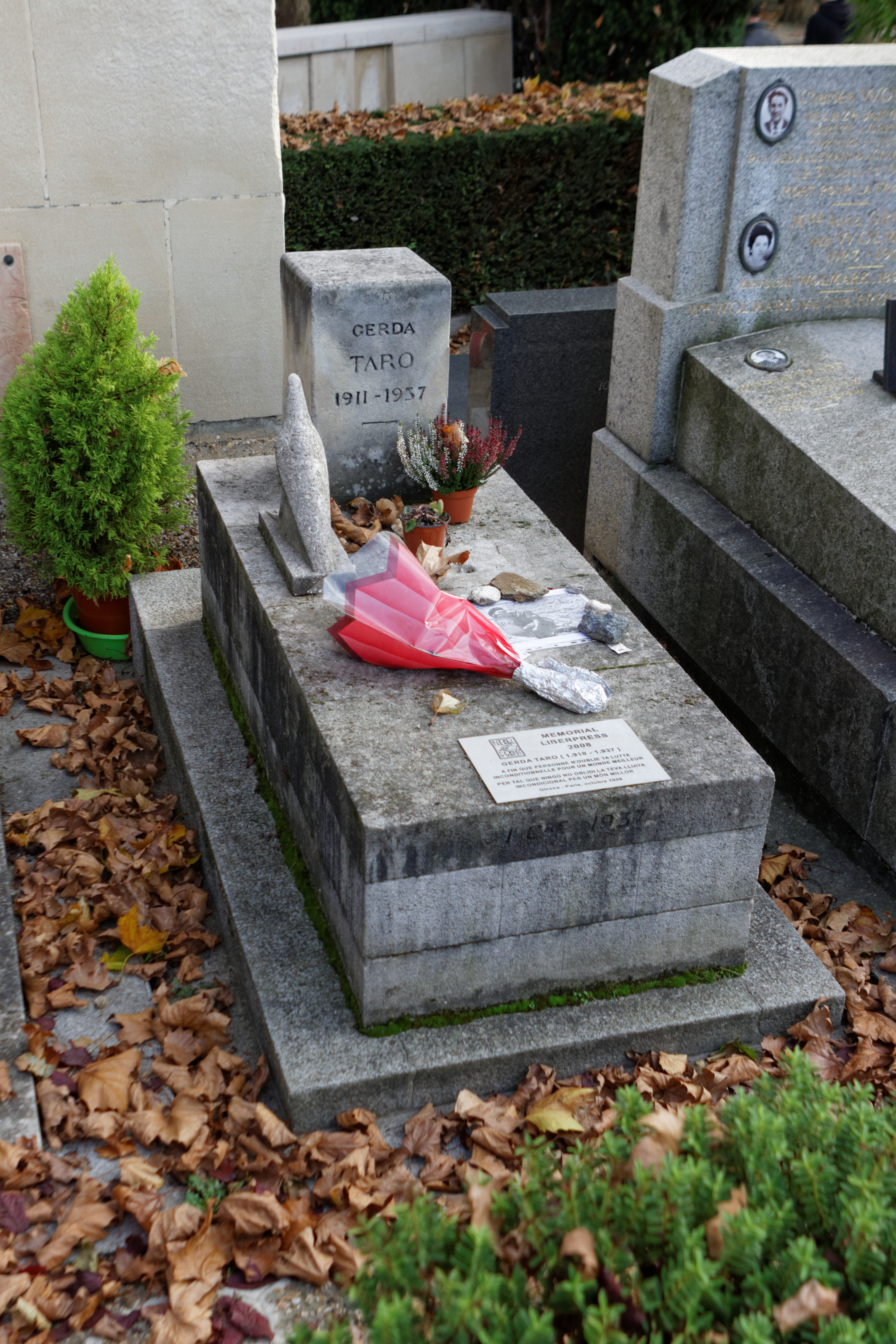 Sépulture de Gerda Taro (1910-1937), photographe allemande connue notamment pour ses reportages sur la Guerre d'Espagne. La tombe est dessinée par le sculpteur Alberto Giacometti à la demande de Louis Aragon : il l'orne d'une simple vasque et d'un oiseau mythologique, le faucon Horus, symbole de lumière et de résurrection.